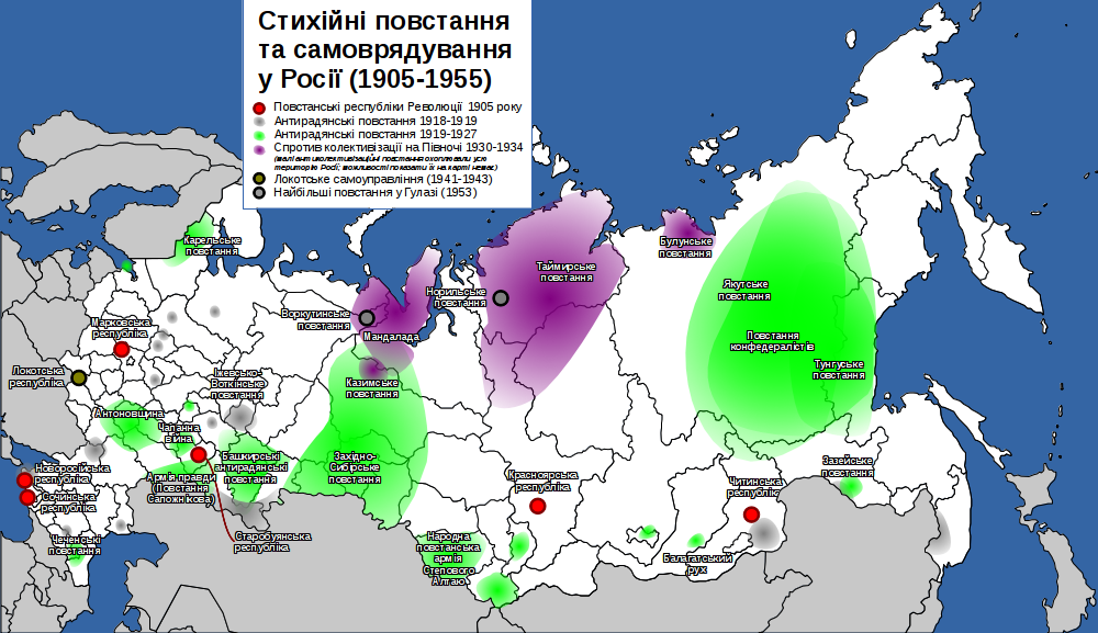 Стихійні повстання та стихійне місцеве самоврядування в Росії у 1905-1955 роках